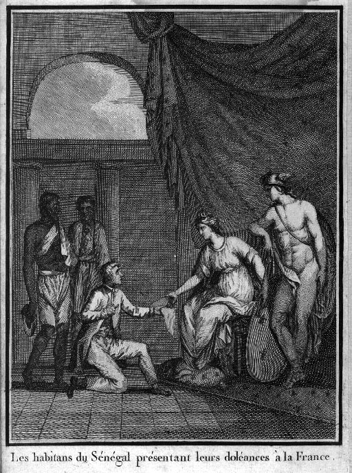 Cahier de Doléances de Saint-Louis du Sénégal (illustration de L'Afrique et le peuple africain considérés sous tous leurs rapports avec notre commerce et nos colonies. De l'abus des privilèges exclusifs et notamment de celui de la Compagnie du Sénégal. Ce que c'est qu'une société se qualifiant d'Amis des noirs de Dominique Harcourt Lamiral, 1789)